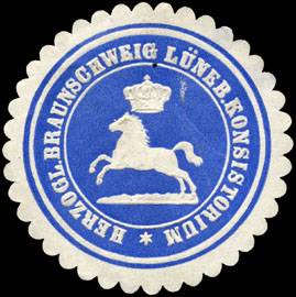 Sealing stamp Title: Herzoglich Braunschweig Lüneburgische Konsistorium Description: blau, weiß, geprägt Place: size: 4 cm